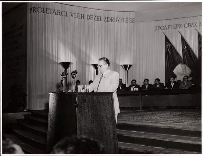 Srpski (latinica): Titov govor na Petom kongresu KPJ